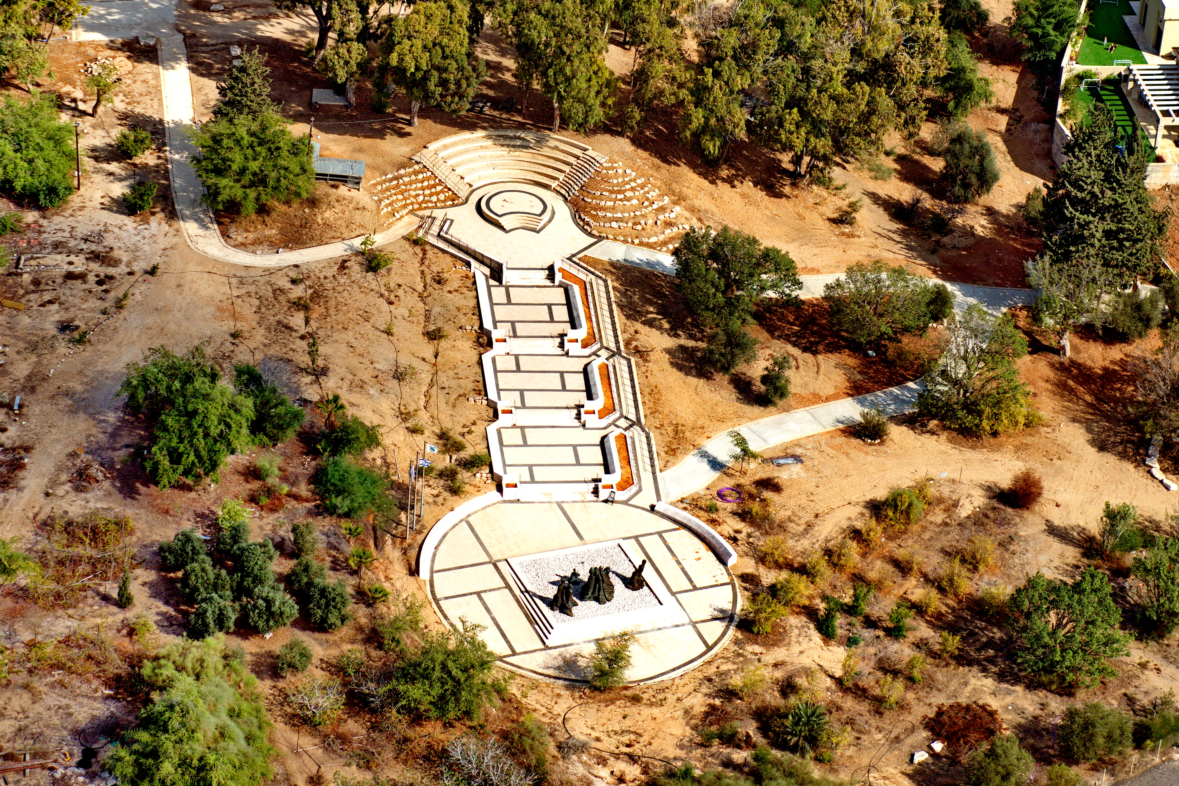 אנדרטה באתר של ניצנים הישנה. במקום מספר פסלי ברונזה של נשים שפיסלה הפסלת שוש חפץ. האתר נחנך בשנת 1998 במלאת 50 שנה לקרב על ניצנים ומוקדש לשלוש לוחמות שנפלו בקרב: מירה בן ארי, שולמית דורצ'ין ודבורה אפשטיין.